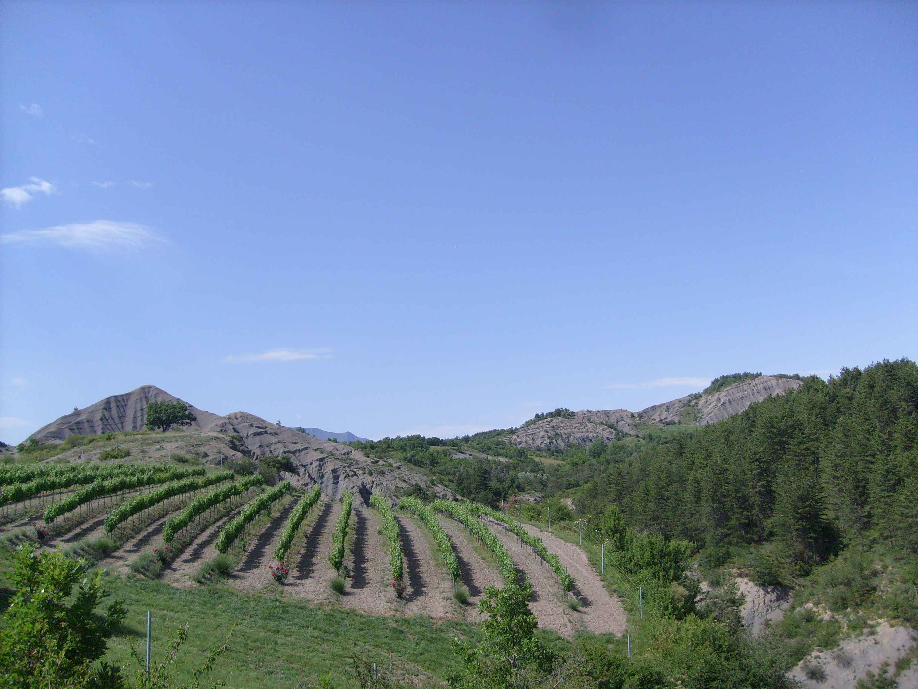 Culture de la vigne sur les hauteurs de Châteauvieux, France.